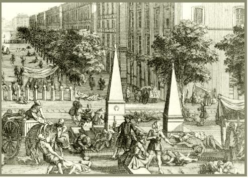 Gravure d'un contemporain de la Peste de Marseille en 1720. Cette vue correspond à l'actuel Quatier Belsunce